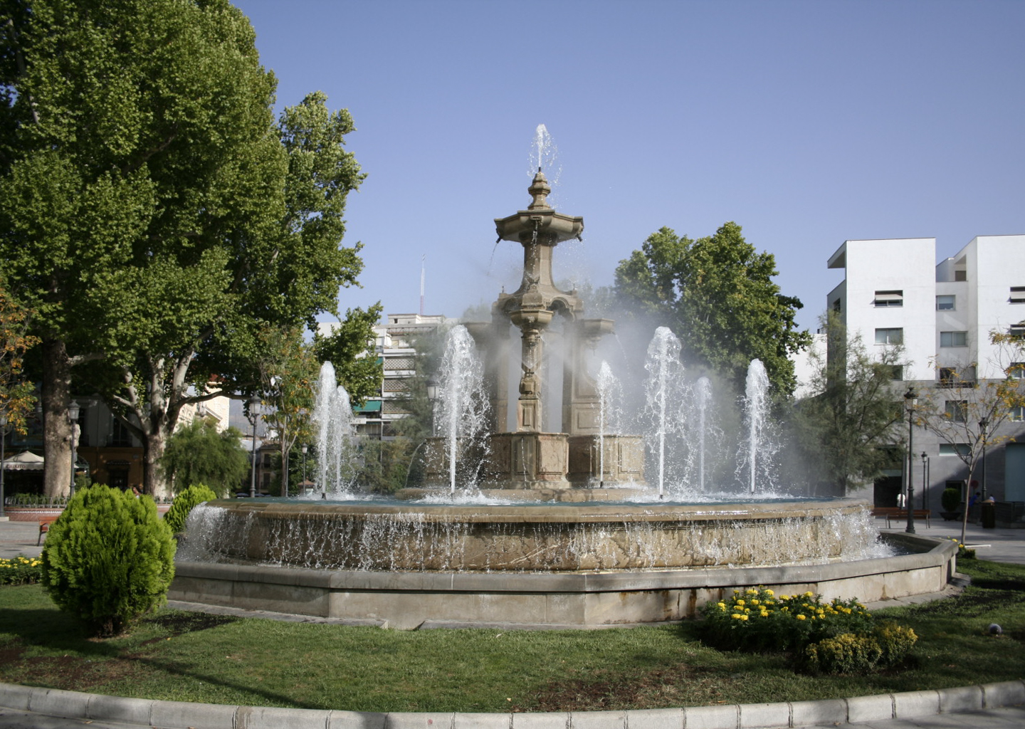 Fuente de las Batallas (Battles Fountain), Granada